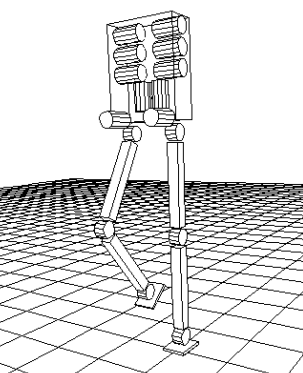 A drawing of biped walking robot model.